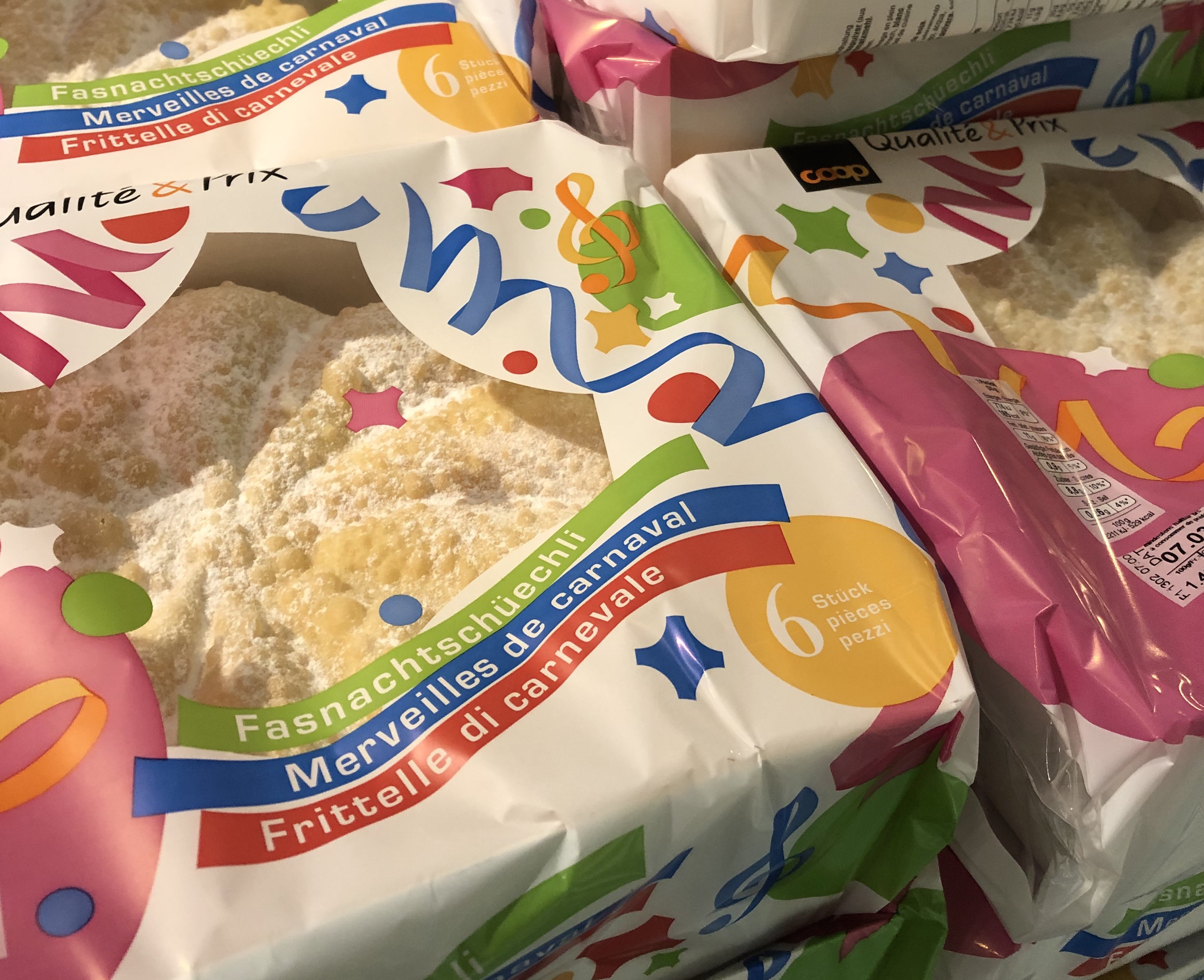 In Schachteln verpackte Fasnachtsküchlein in einem Schweizer Supermarkt (Coop)